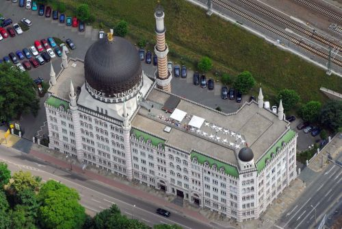 Dresden 29.06.2006 Blick auf das ehemalige Fabrikgebäude der Zigarettenfabrik Yenidze, es gehört zu den architektonischen Sehenswürdigkeiten der Stadt Dresden.